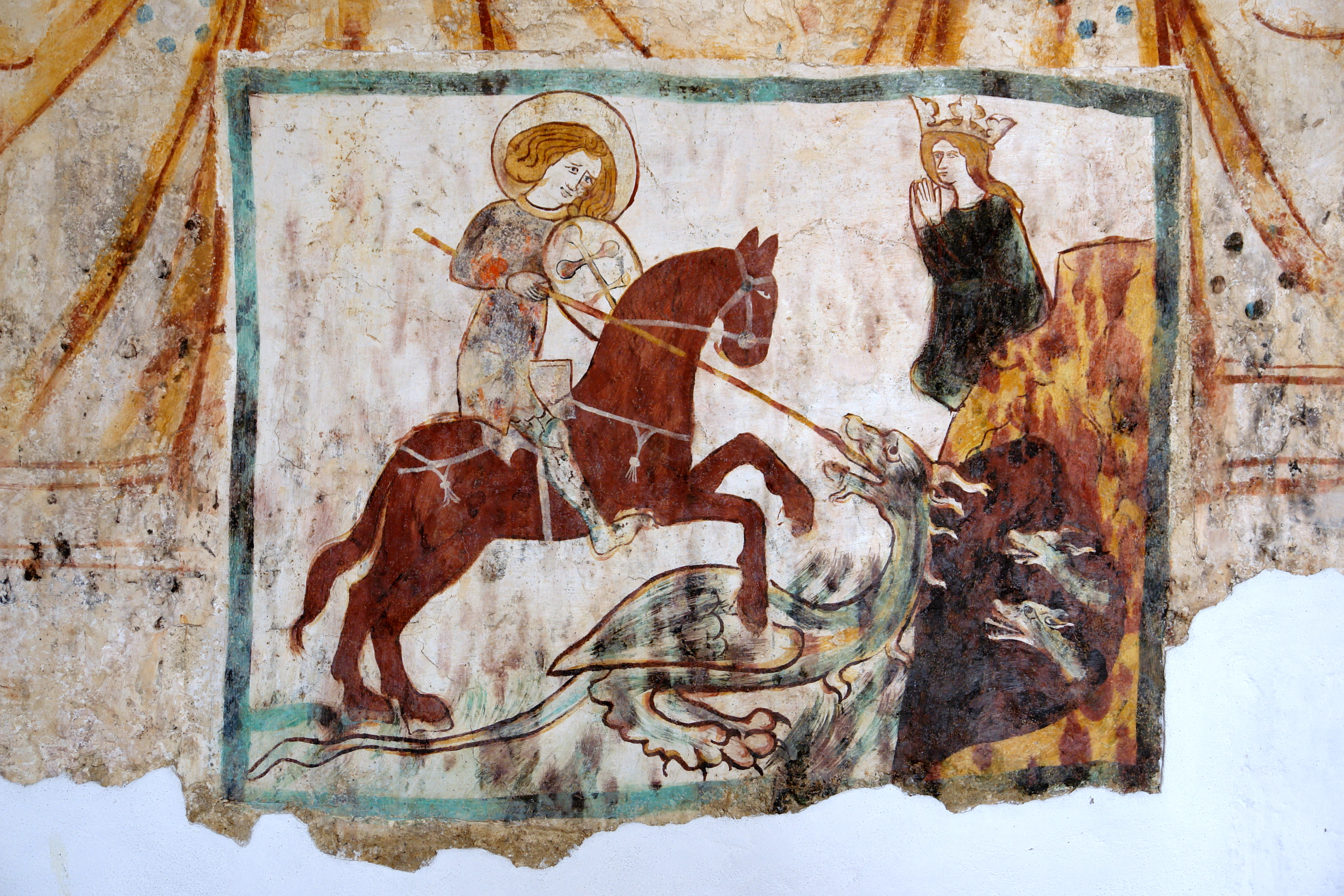 Szent Mátyás apostol tiszteletére szentelt kora gótikus templom, Zolna.